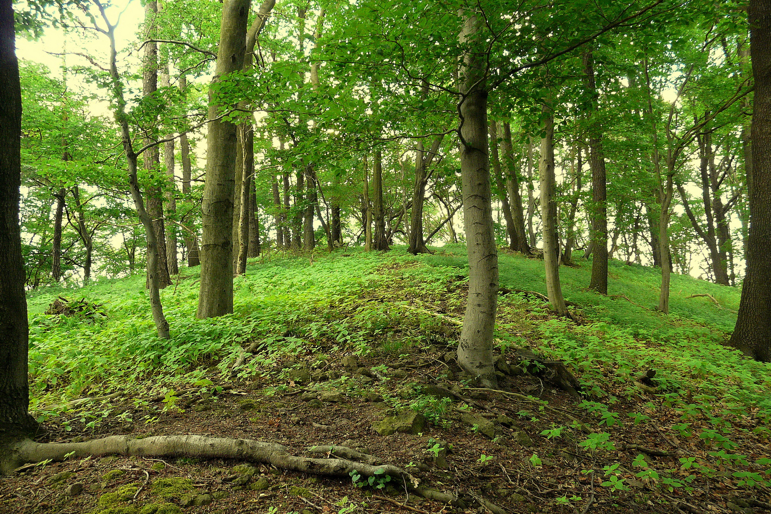 Zalesněný vrchol Strážného vrchu